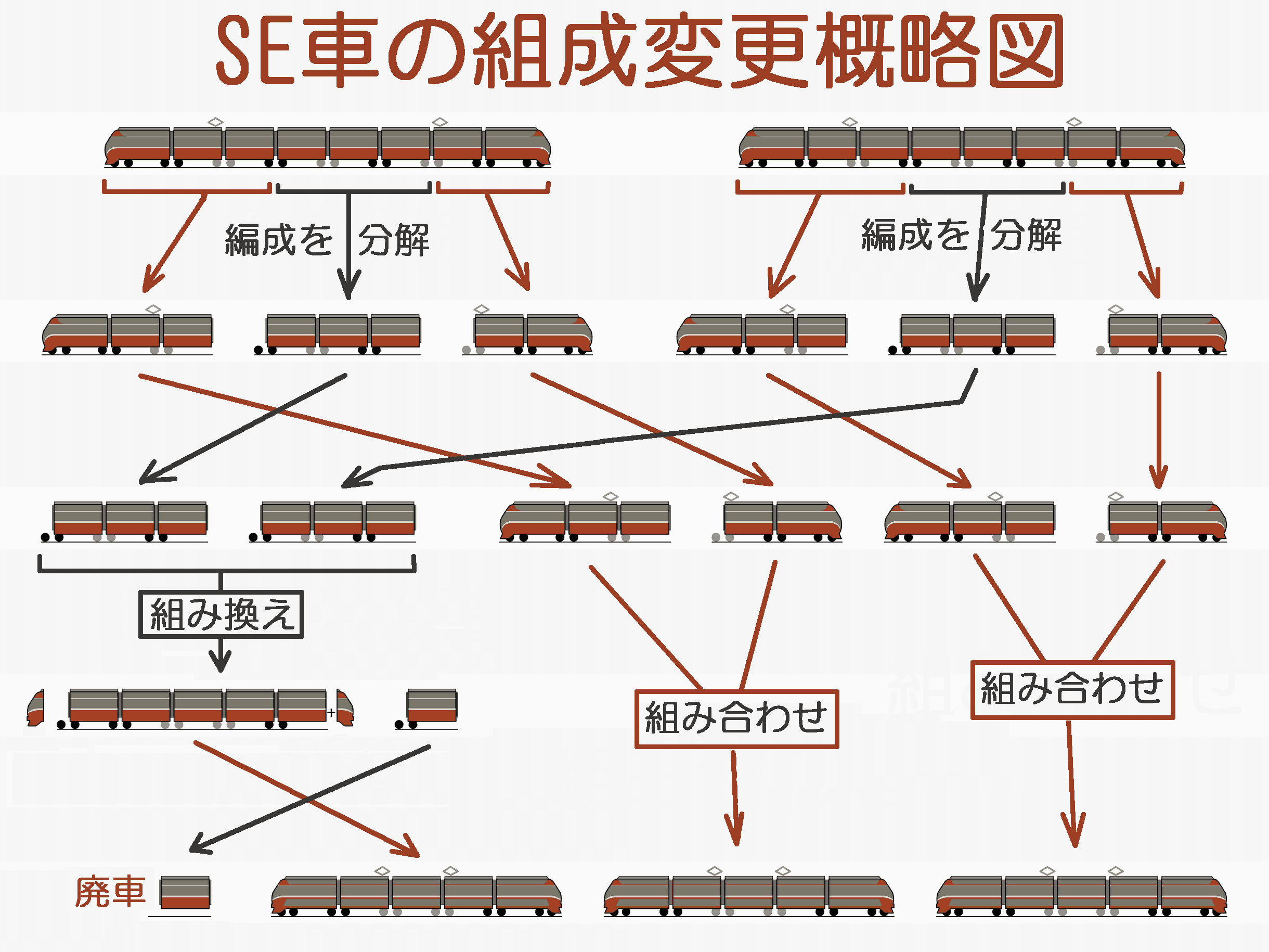 小田急電鉄3000形SE車の組成変更を示した図